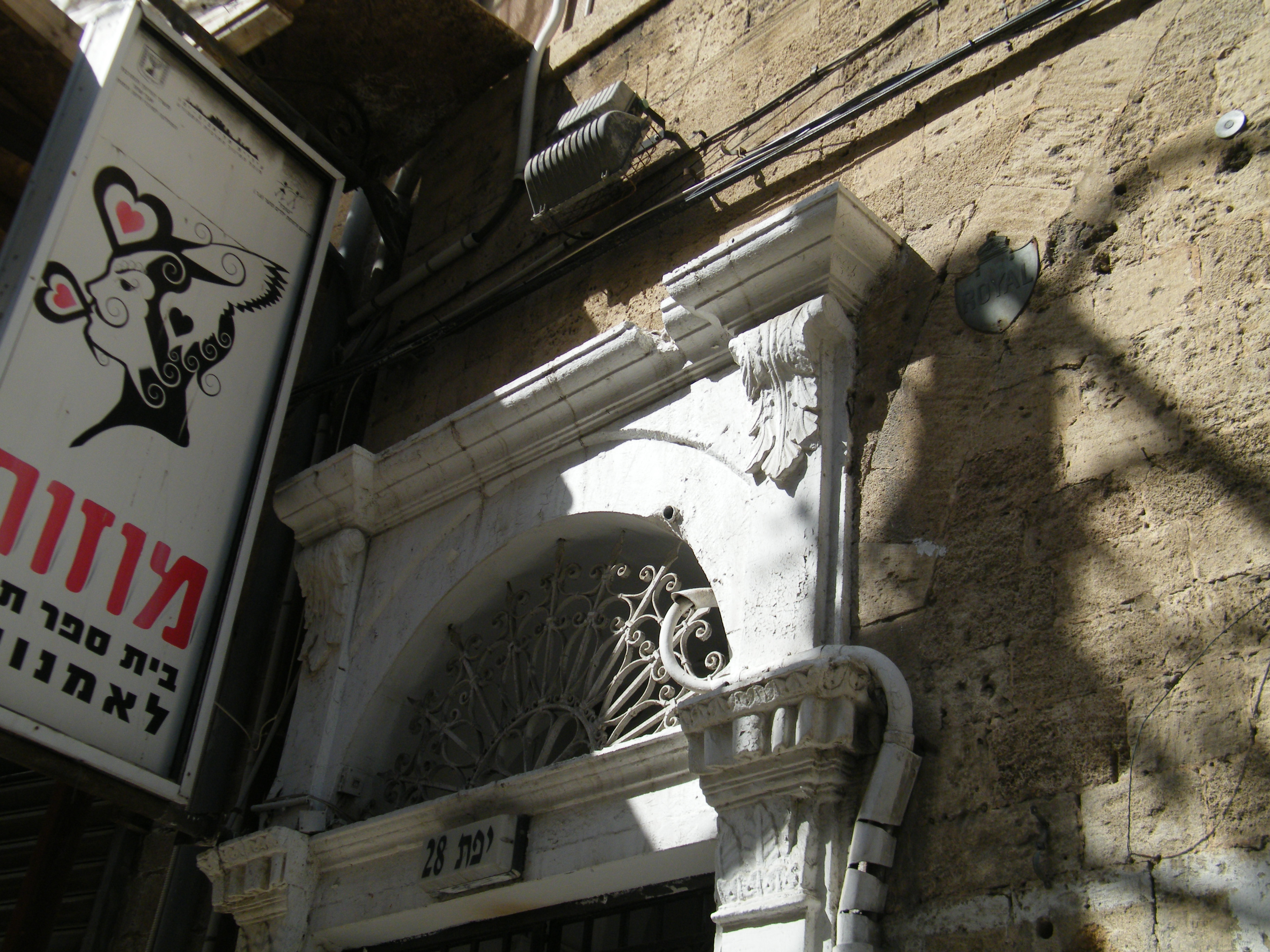 מרכז האמנויות ברחוב יפת בתל אביב-יפו